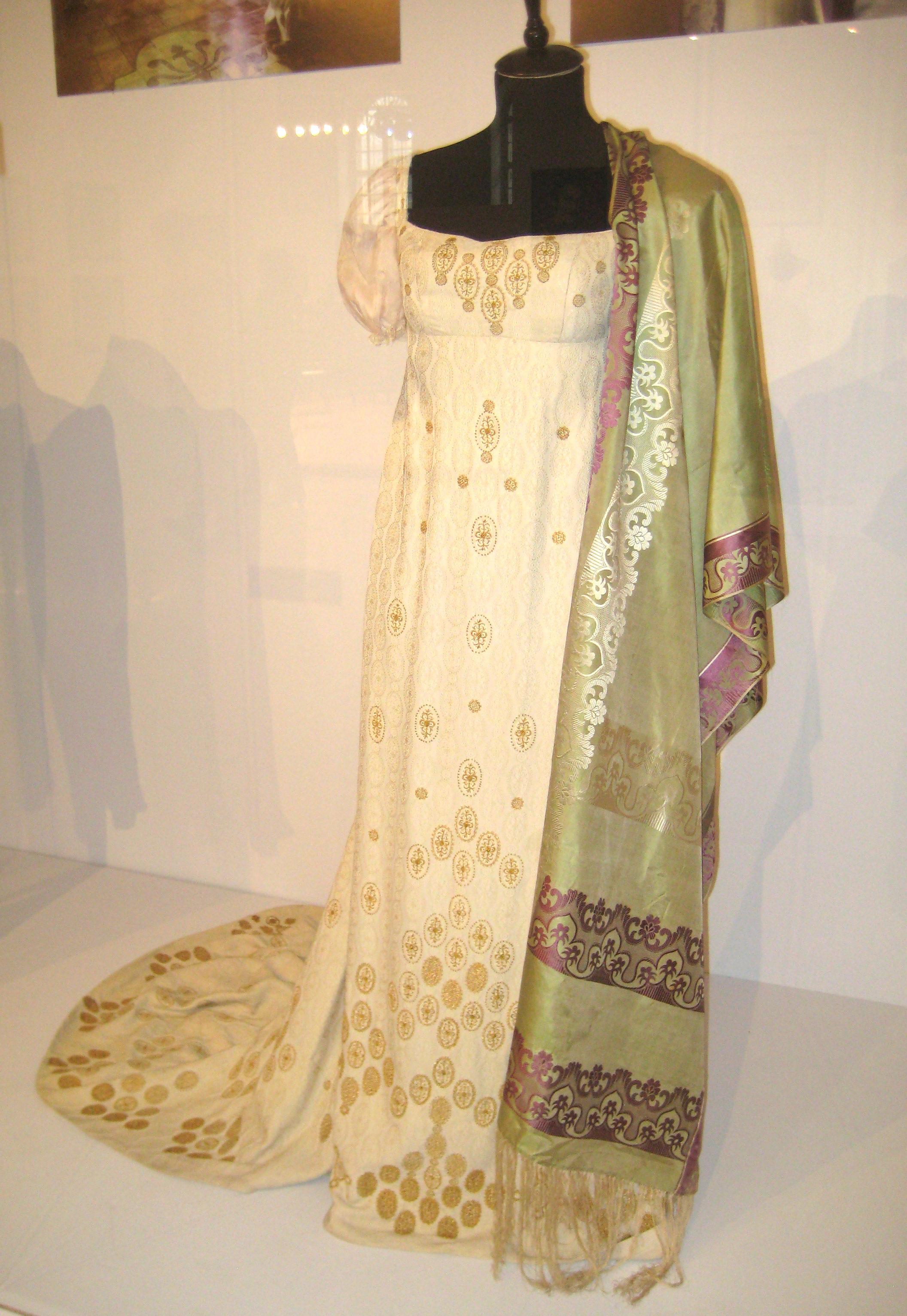 Костюмы из кинофильма "Война и мир" С. Бондарчука. Художник по костюмам Н.В. Бузина. 1965-67. Музей: Мосфильм. Выставка: Время незабвенное, Манеж, 2012